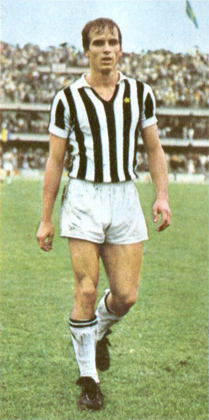 Verona, stadio Marcantonio Bentegodi, 30 agosto 1970. Il calciatore italiano Gianluigi Roveta alla Juventus, in occasione della trasferta sul campo del Verona (1-1) valevole per il primo turno della Coppa Italia 1970-71.